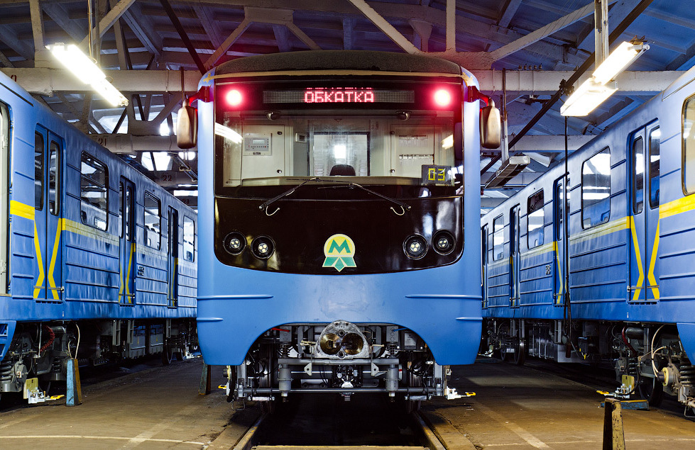 Вагоны метро типа Е-КМ-Гб в депо Дарница.